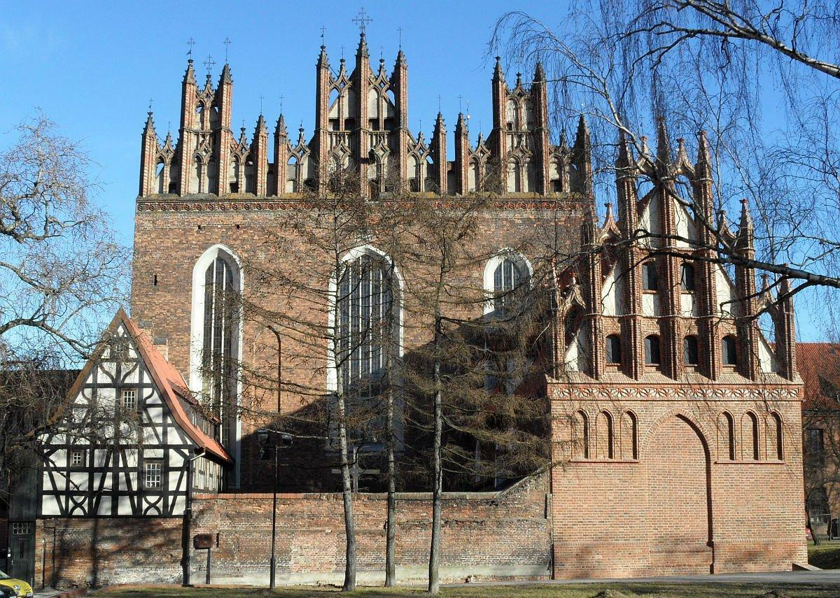 Od lewej, Kanzelhaus (Dom galeriowy), kościół Św. Trójcy, kaplica Św. Anny